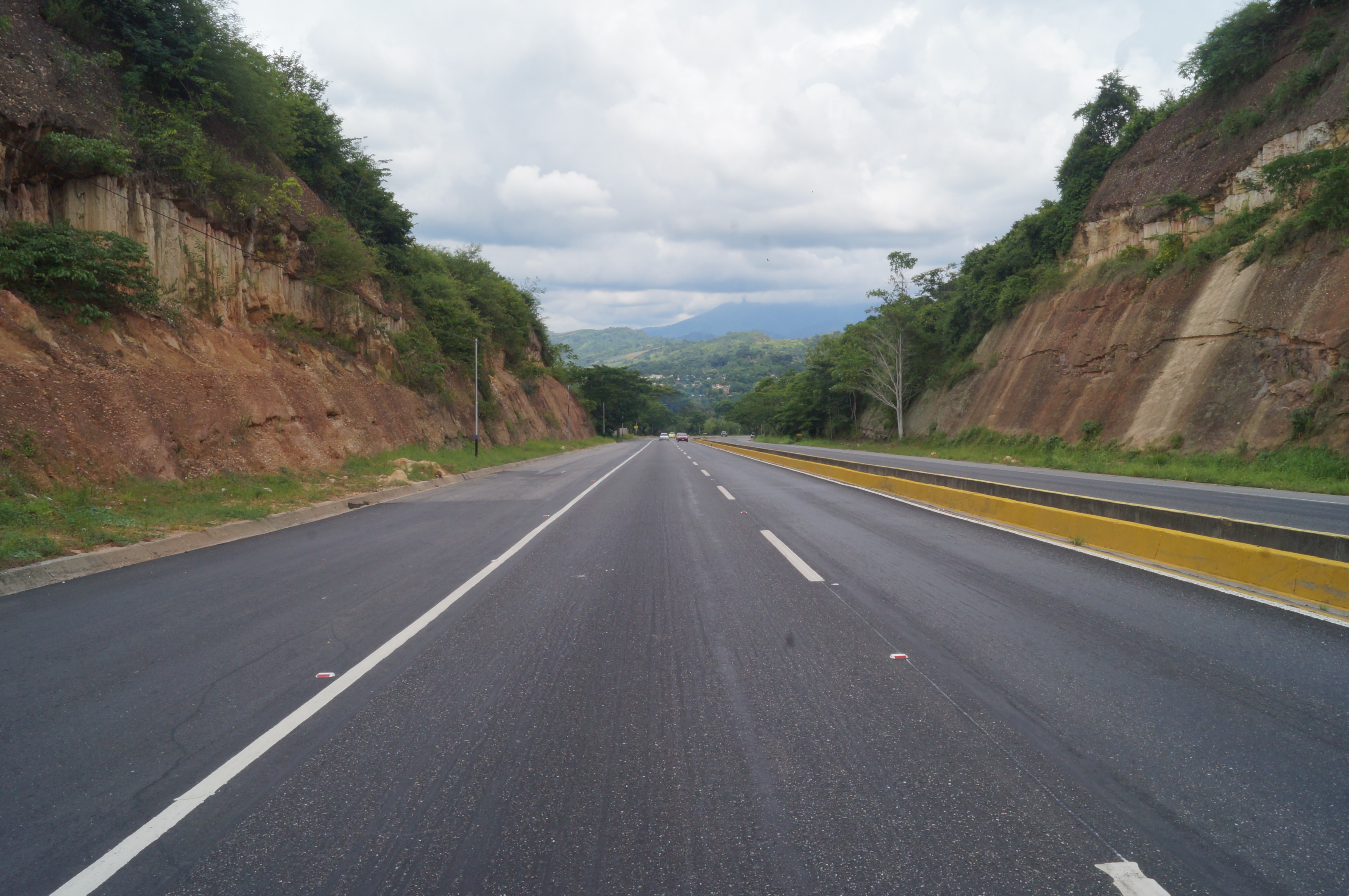 Autopista "General Cruz Carrillo" mejor conocida como Eje Vial Valera – Trujillo